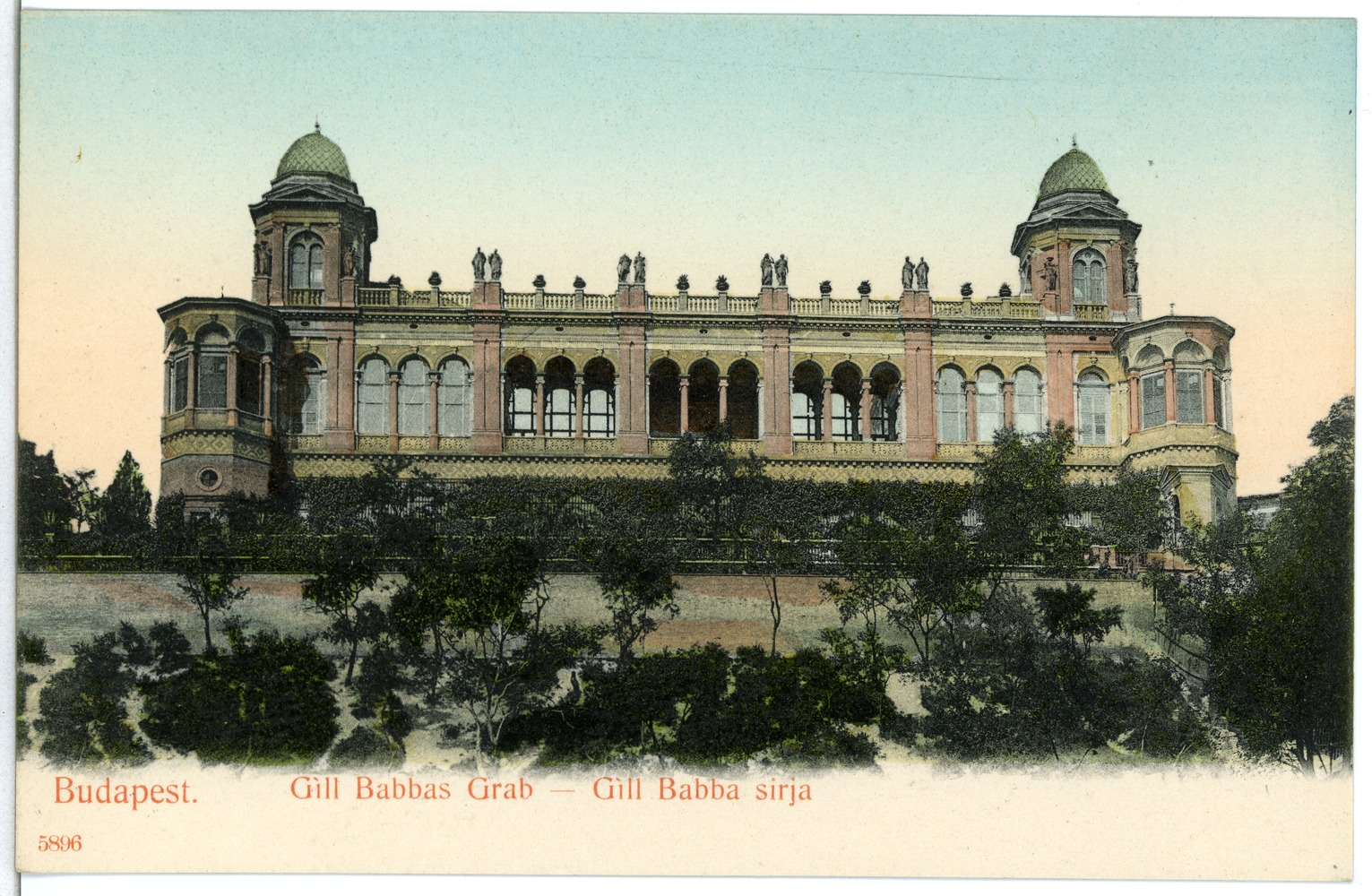 Budapest; Gill Babbas Grab Diese Ansichtskarte stammt vom Kunstverlag Brück & Sohn aus Meißen ( Die Karte hat die eindeutige Nummer 05896 und ist in höherer Auflösung beim Verlag erhältlich. Sie wurde im Rahmen einer Kooperation zwischen Wikipedianern und dem Kunstverlag für Wikimedia Commons zur Verfügung gestellt.